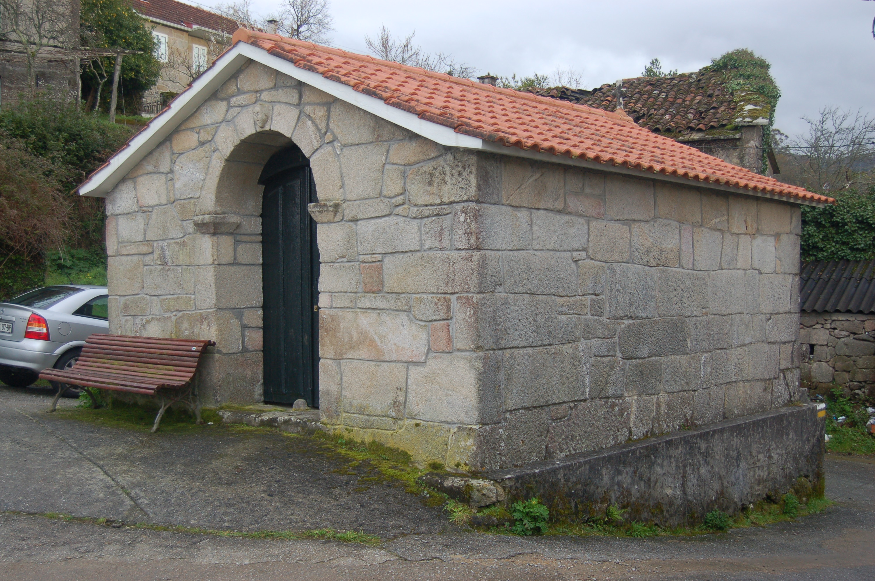 Capela de San Xoán Evanxelista en Dorna (Sacos, Cerdedo-Cotobade)